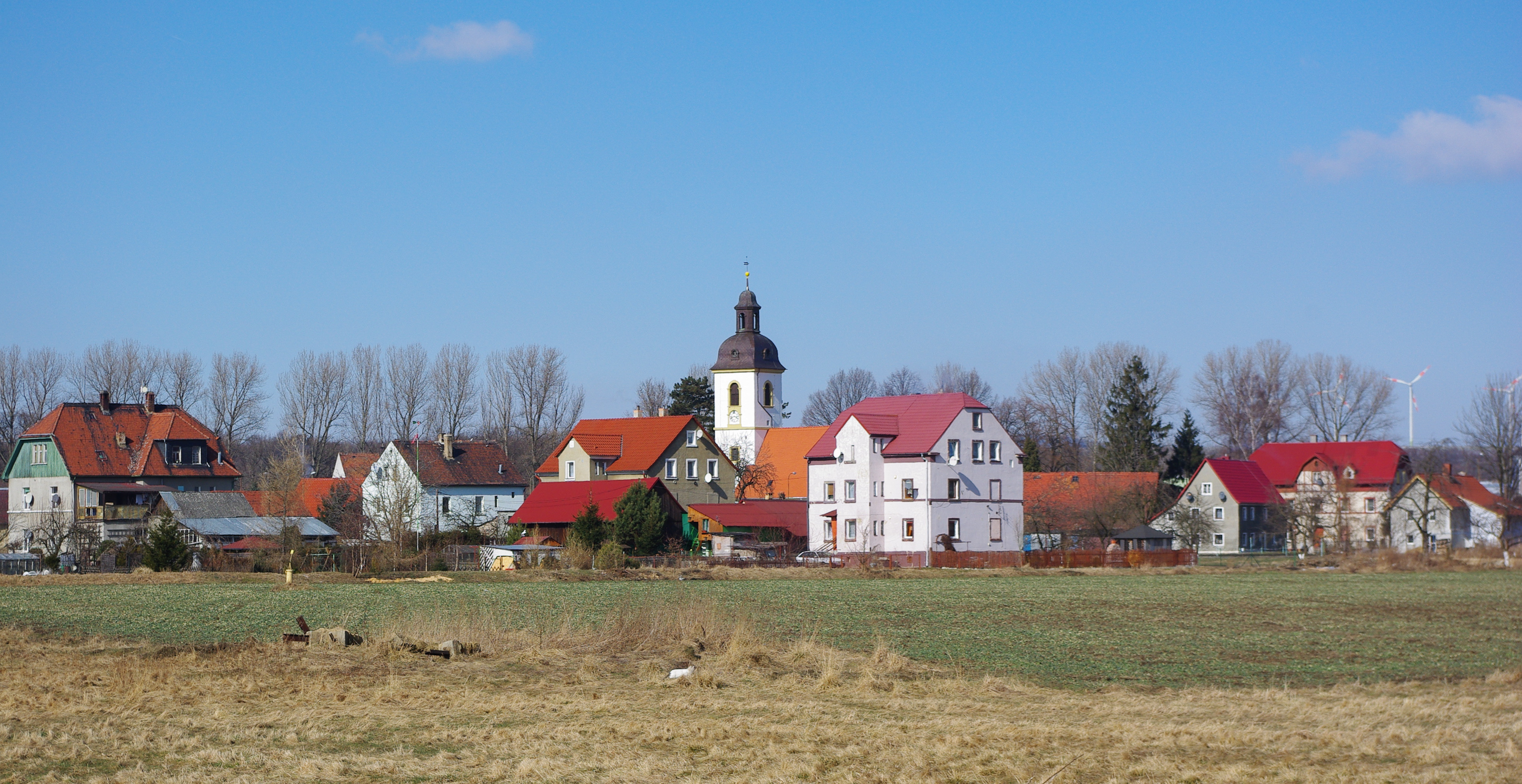 Sieniawka, krajobraz